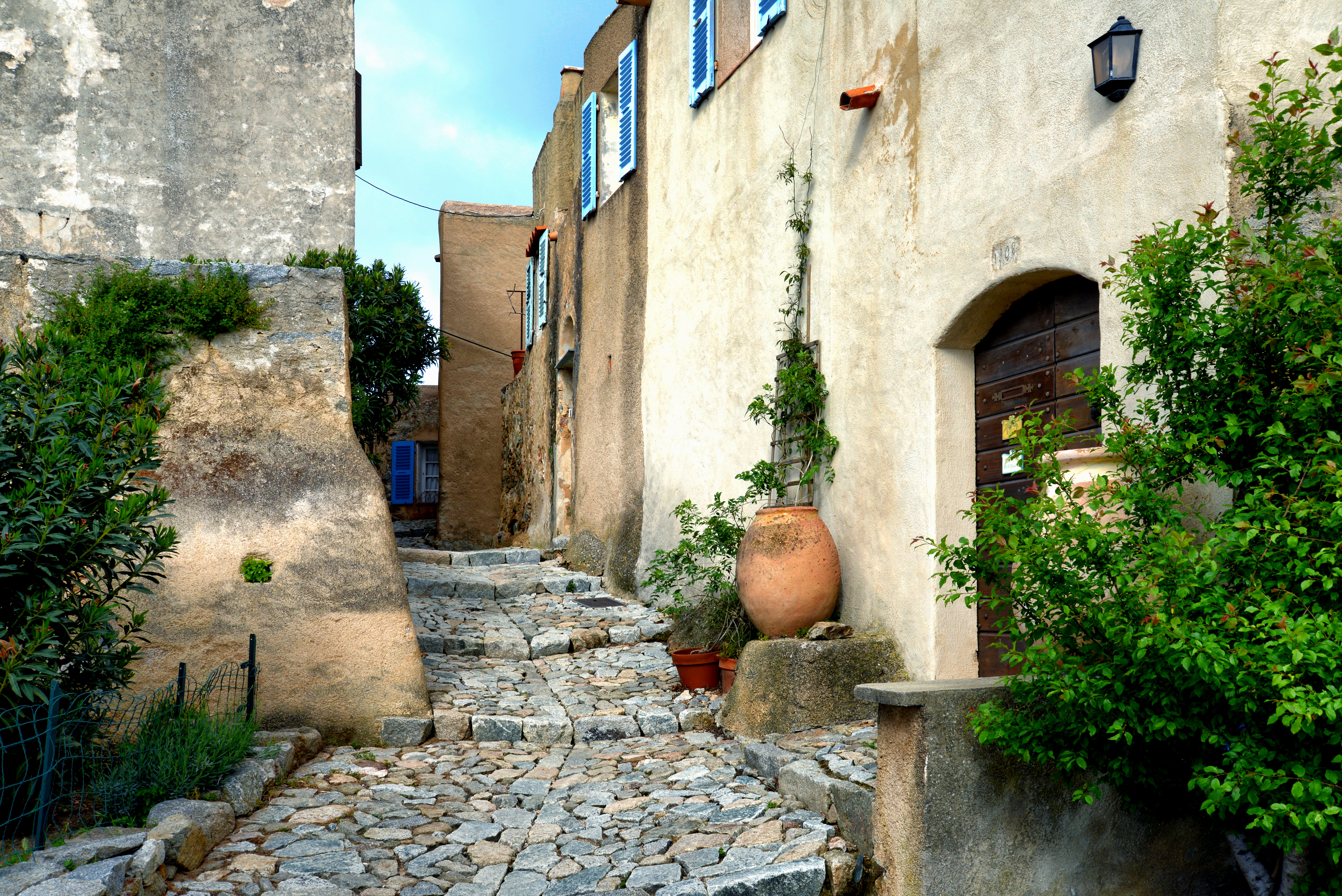 Pigna, Balagne (Corse) - Dans les ruelles du village de l'Artisanat d'Art, avec toutes ses maisons aux volets bleus